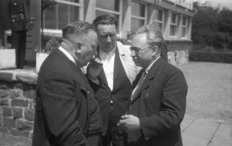 Ministerpräsidenten-Konferenz der Länder der 3 Westzonen Deutschlands auf dem Berghotel Rittersturz in Koblenz (v.l.n.r.: Josef Müller, Emil Bettgenhäuser, Erich Ollenhauer) 8.-10.7.1948